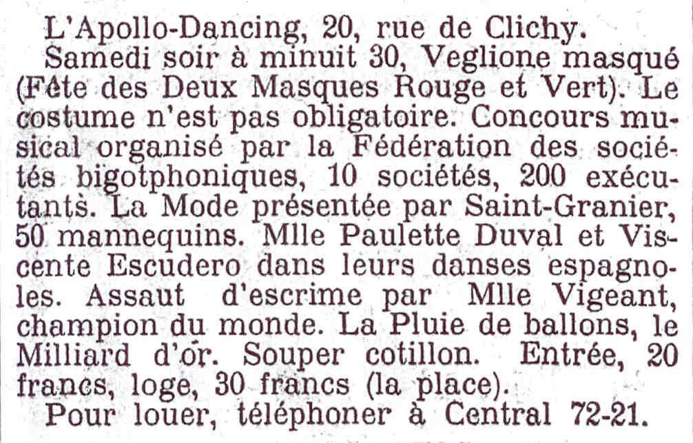 Annonce d'une soirée payante avec bigophones.